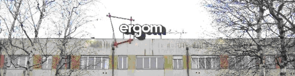 dedtinata ala pagina Ergom automotive